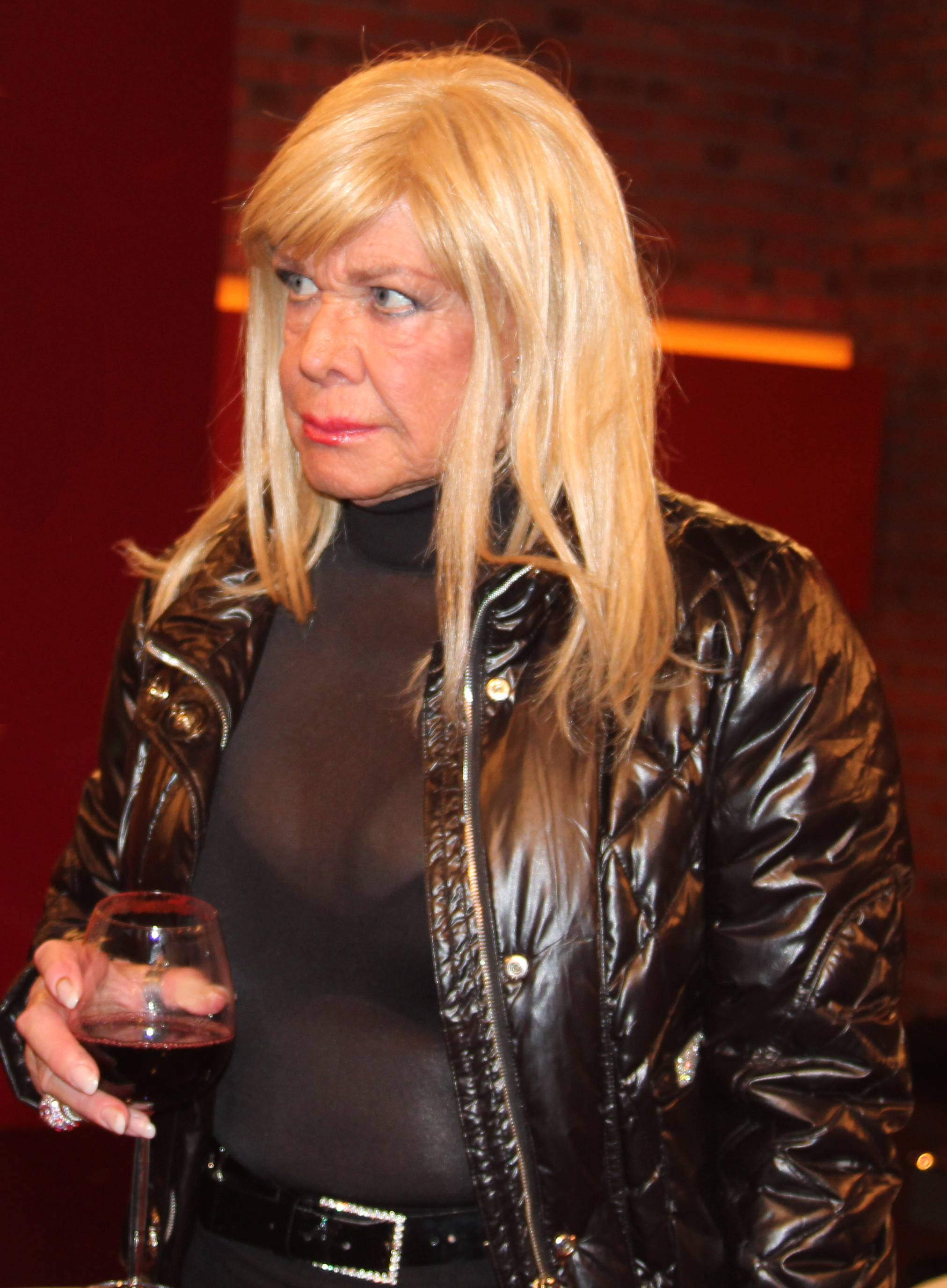 Ingrid van Bergen bei " Markus Lanz"